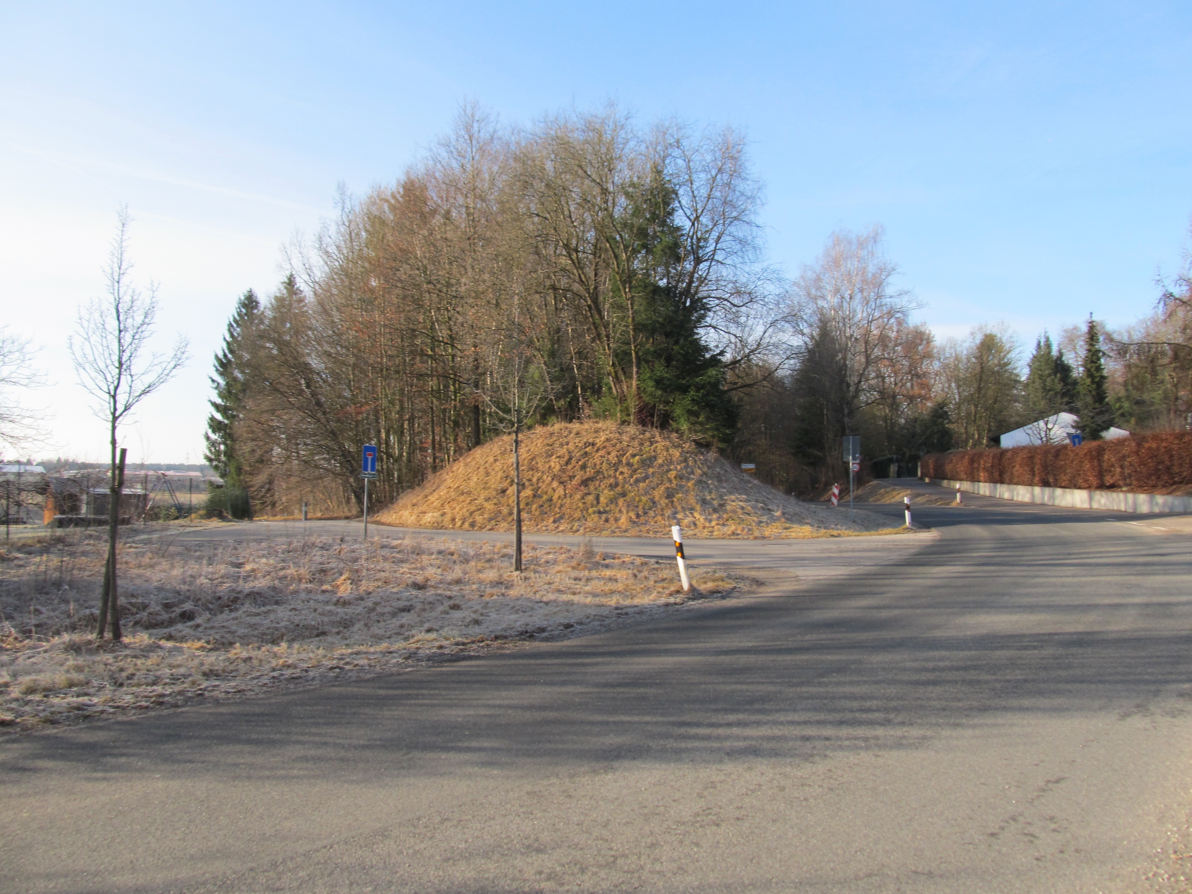 Ehemaliger Bahndamm der Bahnstrecke von Grafing nach Glonn südlich von Grafing (Bf), Blickrichtung bzw. ehemalige Fahrtrichtung Taglaching-Moosach-Glonn. An dieser Stelle befand sich bis ca. 2010 die Bahnunterführung der St 2351 bzw. Grafinger Straße nach Taglaching, Siehe BayernAtlas TK 1:25.000 um 1970